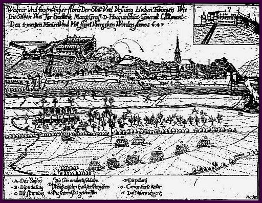 Belagerung von Schloss Hohentübingen durch die französische Armee, 1647 (Stich)